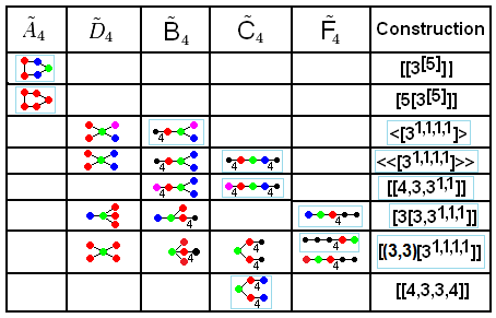 Coxeter-Dynkin diagram equivalences